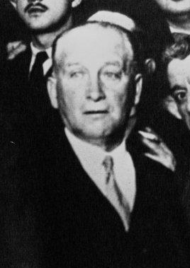 Gobierno republicano